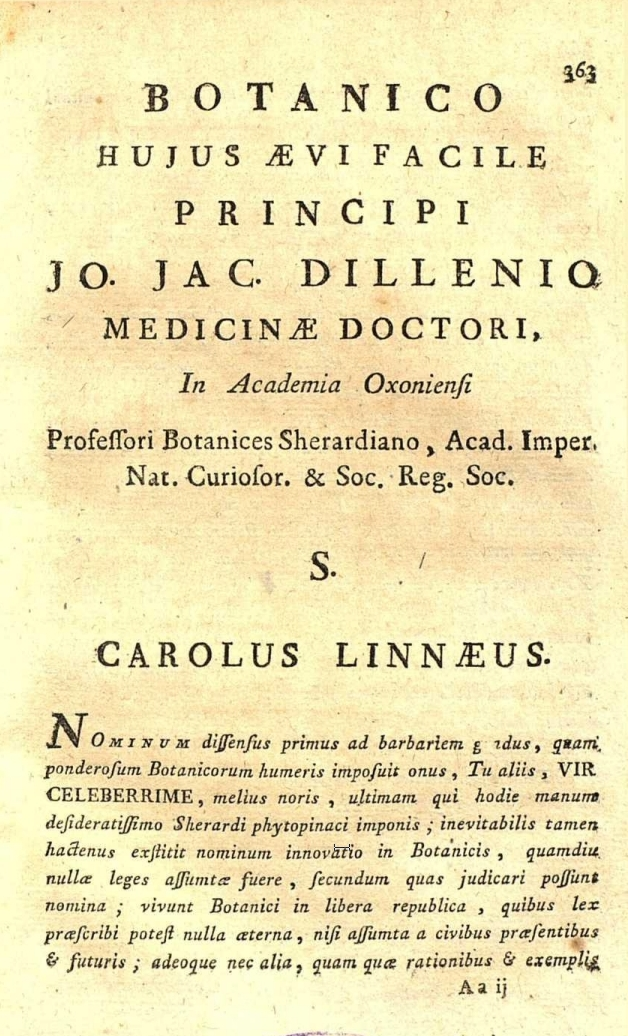 Critica botanica… // Systema plantarum Europae / J. E. Gilibert. — Coloniae-Allobrogum : Piestre & Delamollière, 1787. — Vol. 7. — S. 363